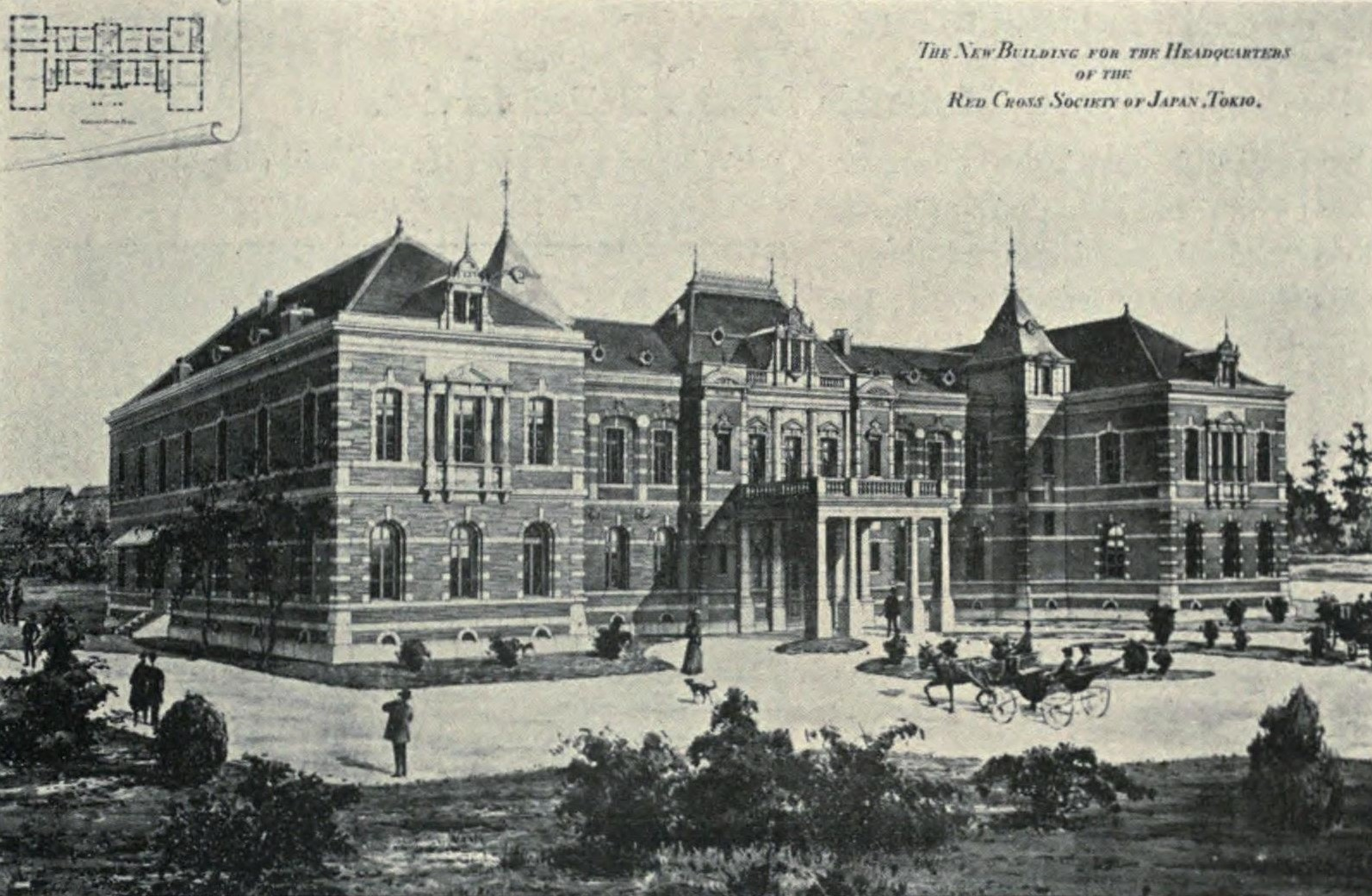 日本赤十字本部 1910